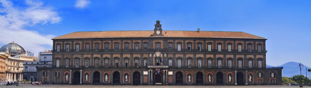 Palazzo Reale da Piazza del Plebiscito con la Galleria Umberto I il Real Teatro San Carlo ed il Vesuvio ai lati.